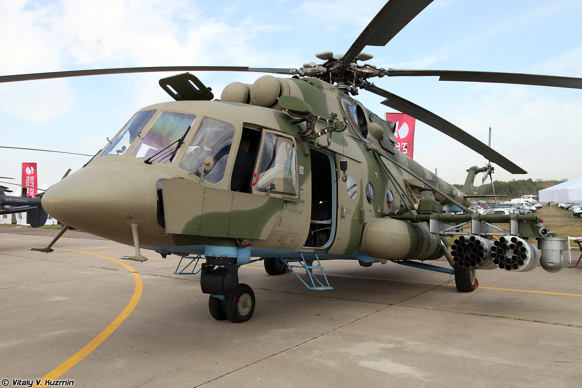 Ми-8АМТШ с бортовым комплексом обороны Л370Э8 Витебск (Mi-8AMTSh with on-board defense system L370E8 Vitebsk)